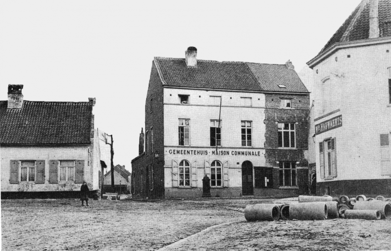 Ancienne maison communale d'Evere (1840 à 1939)